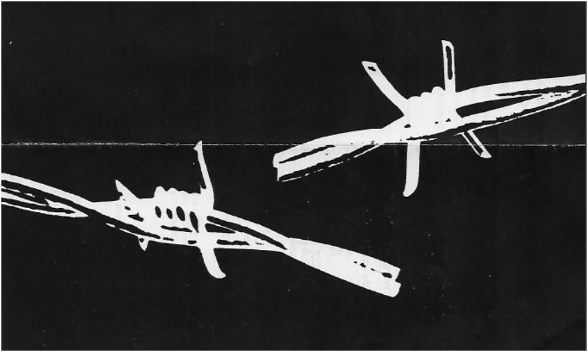 Ursprüngliches Logo der Kirchheimbolander Friedenstage (von 1975)